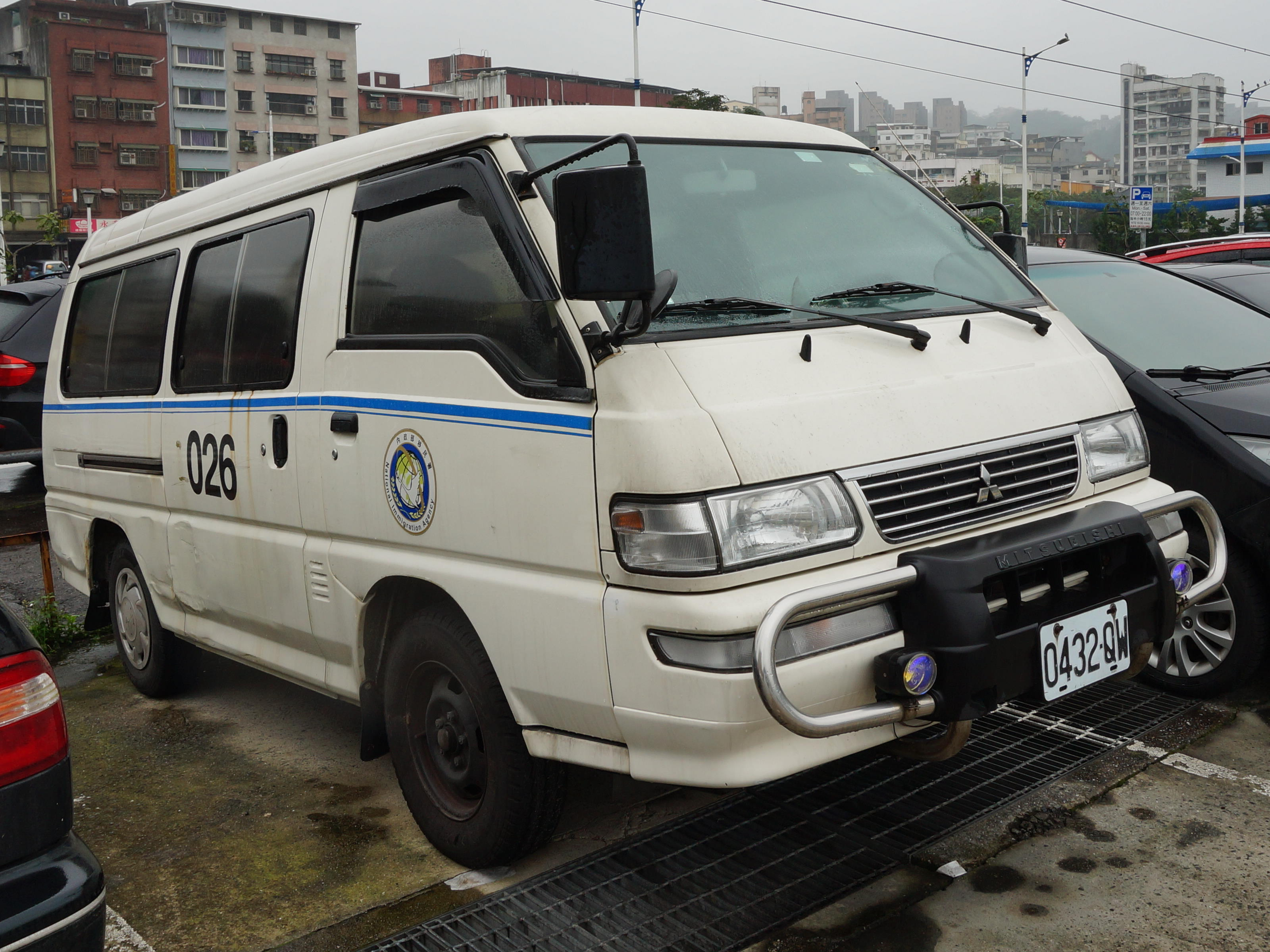 內政部移民署三菱得利卡公務車0432-QW。